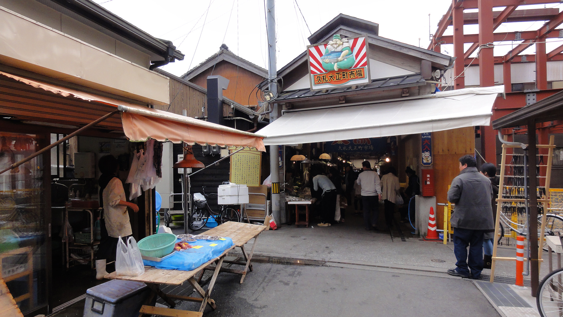 久礼大正町市場